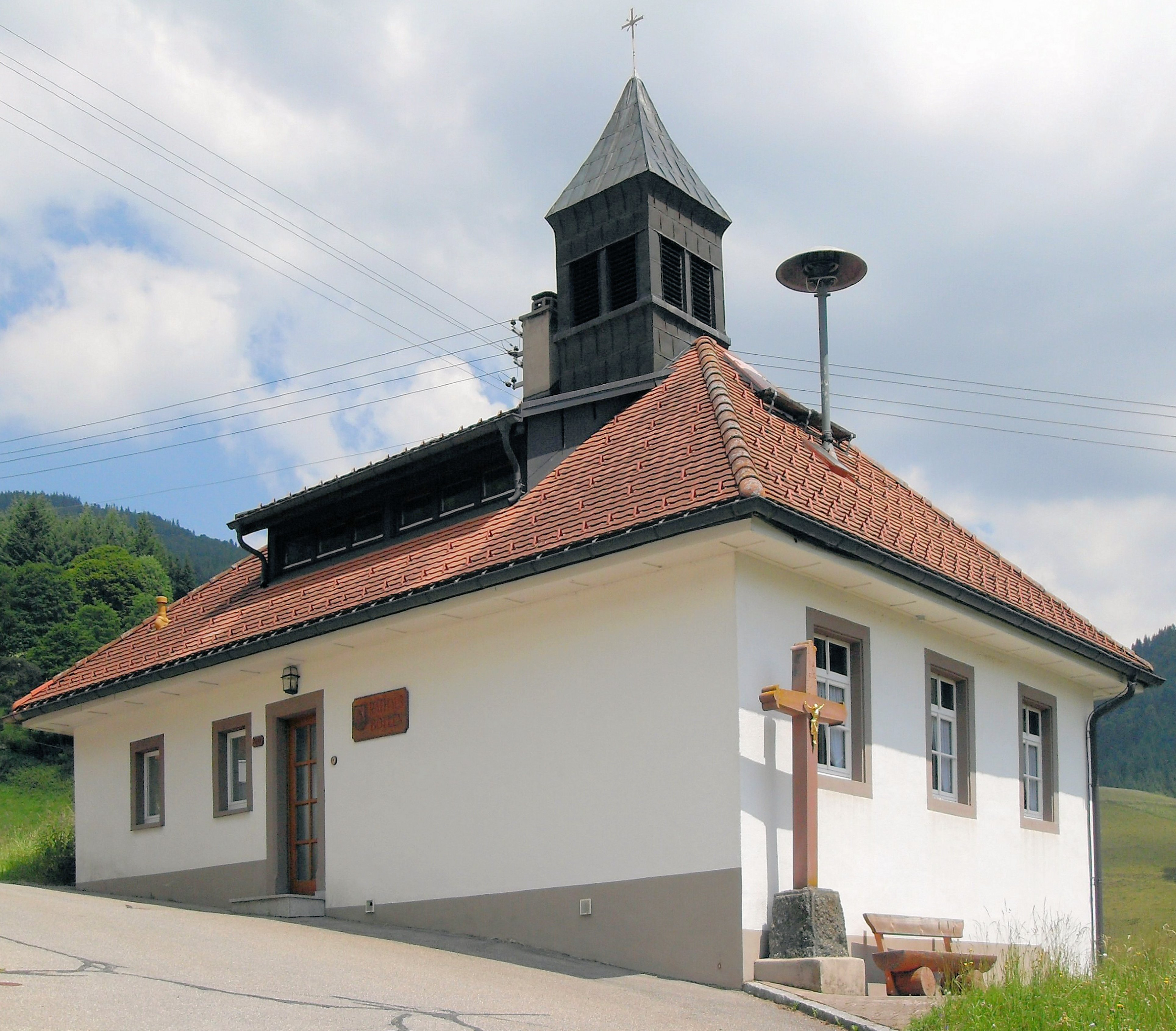 Rathaus Böllen, Schwarzwald, Deutschland